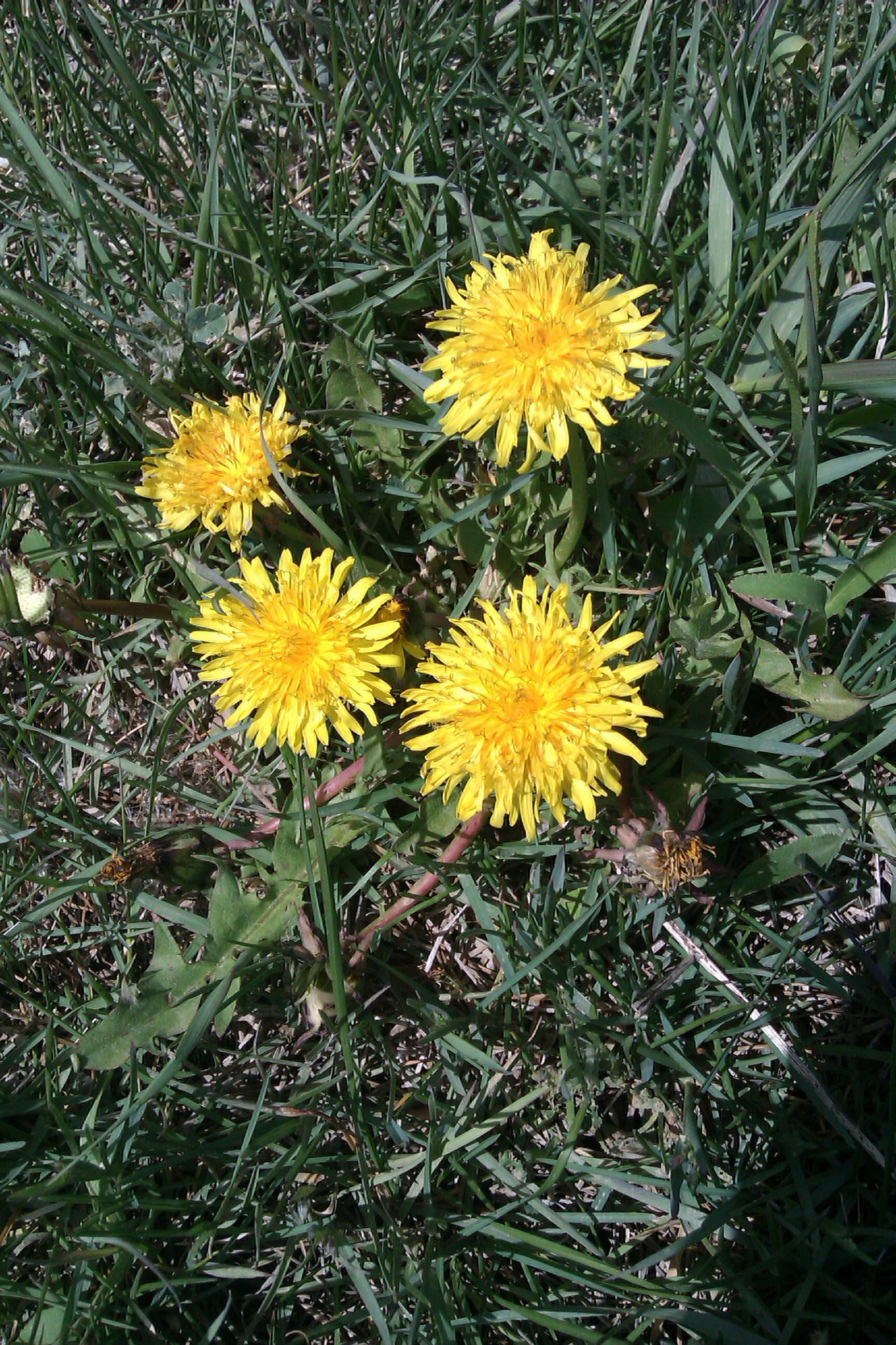 گونه های گیاهی روستای ییلاقی فرج آباد